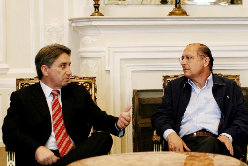 Geraldo Alckmin e Germano Rigotto